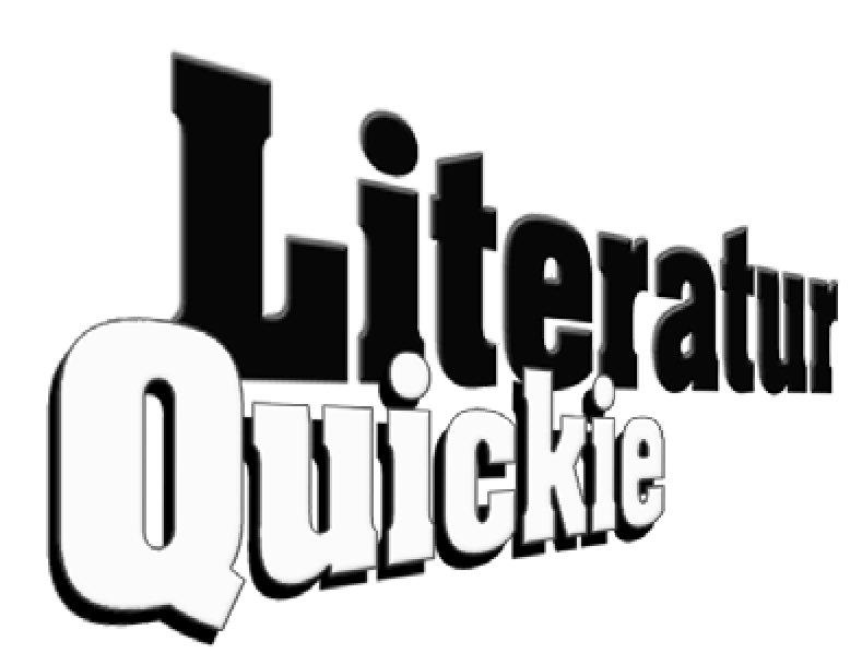 Logo Literatur Quickie Verlag